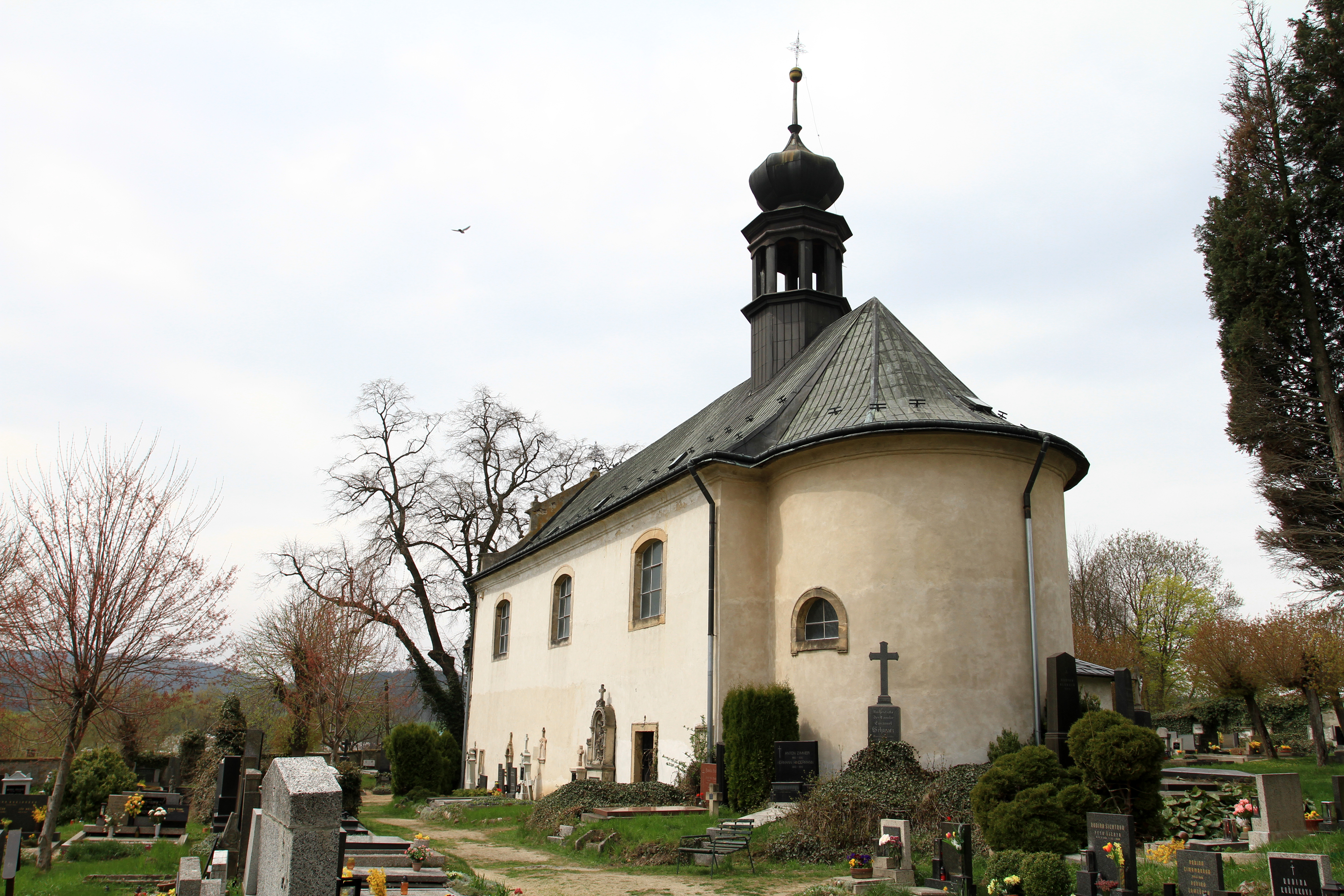 Kostel Nejsvětější Trojice, severně od náměstí, Český Dub